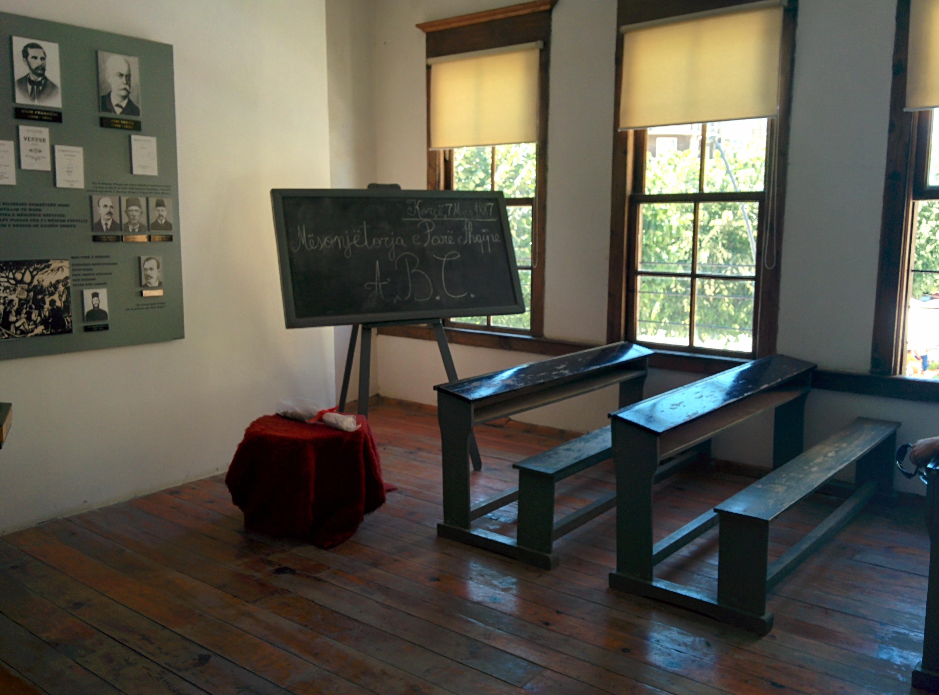 Mesonjetorja e Pare Shqipe